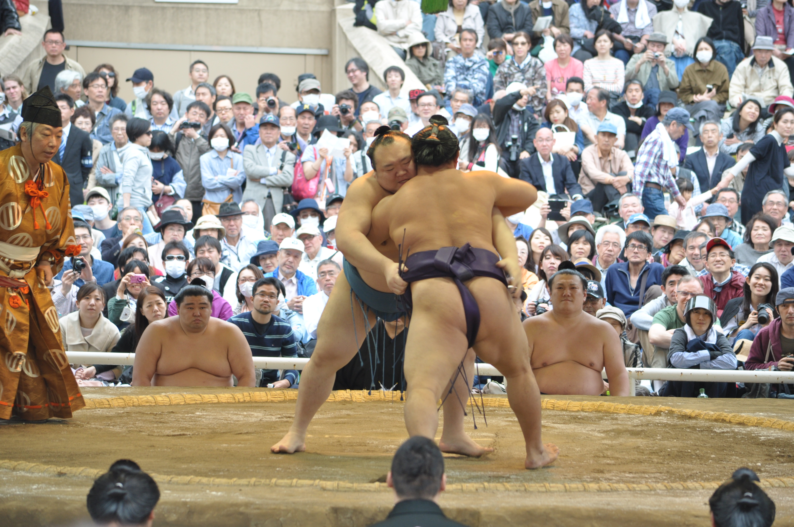 宝富士 大輔